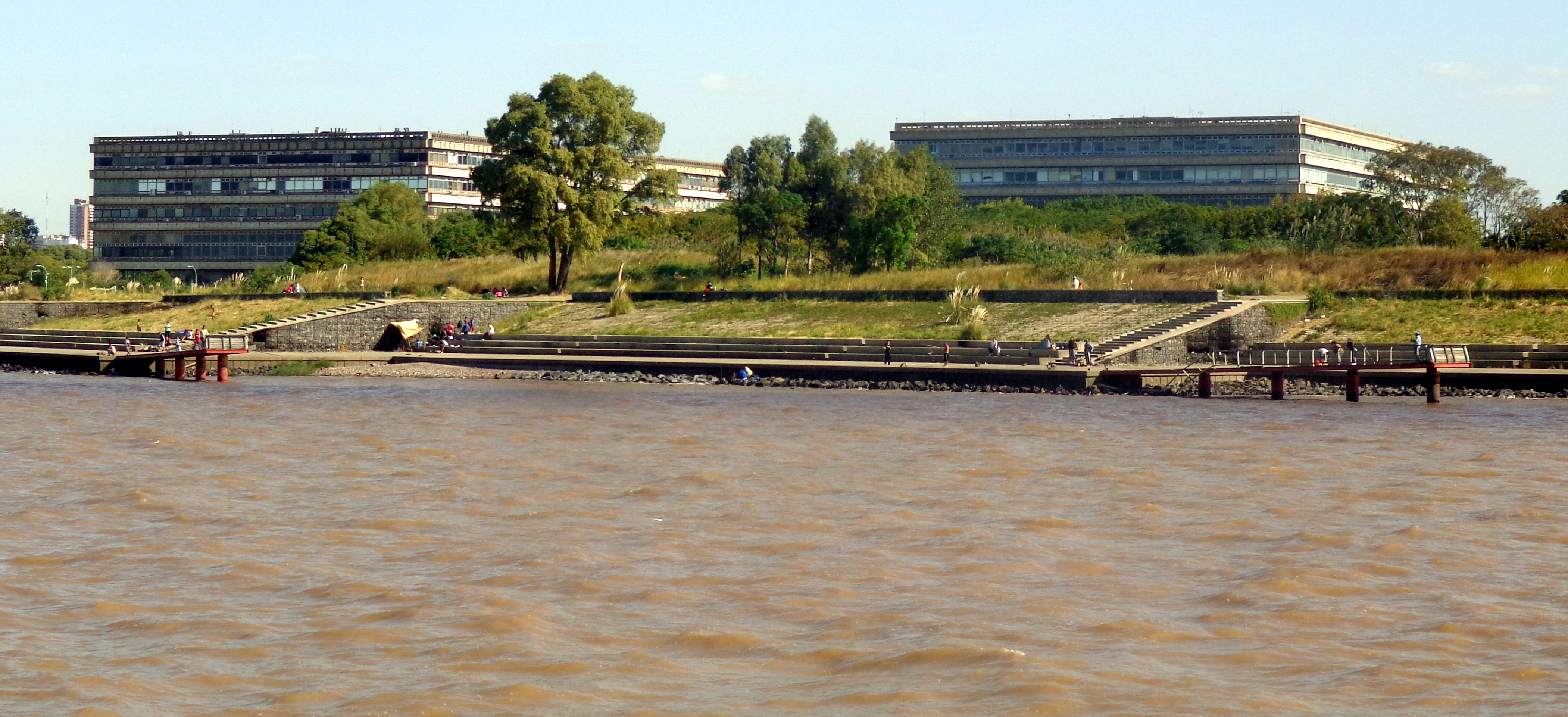 Pabellones II y III de la Ciudad Universitaria de la Universidad de Buenos Aires (UBA) vistos desde el Rio de la Plata.